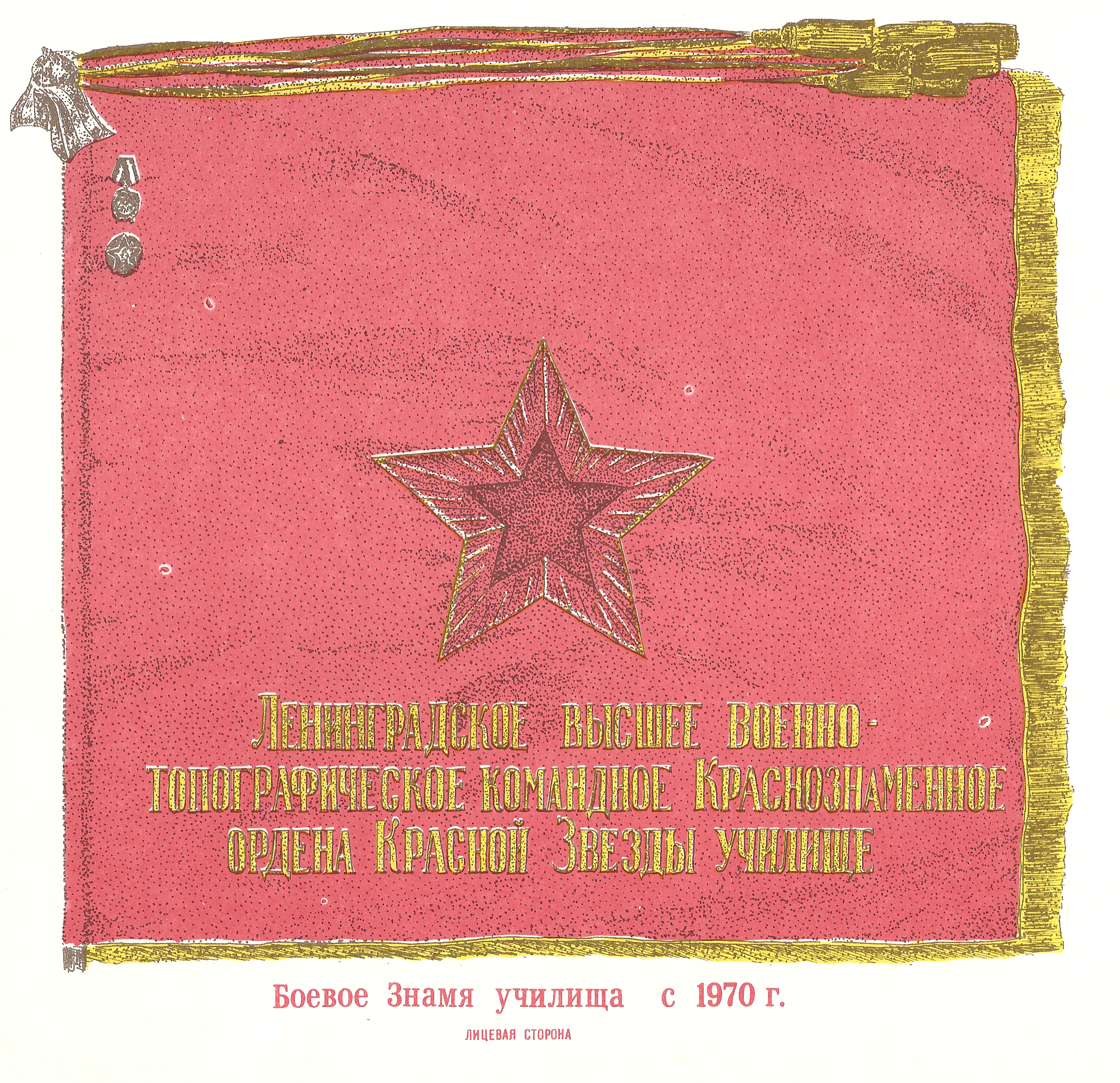 Изображение боевого знамени военно-топографического училища 1970 года (лицевая сторона)